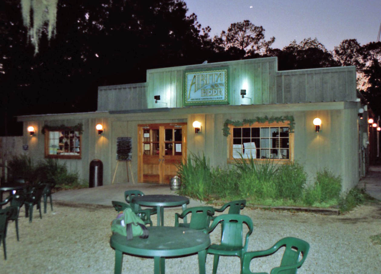 Abita Brew Pub, Abita Springs, Louisiana